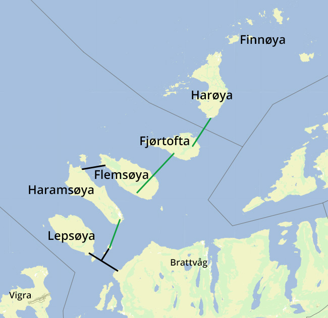 Omtrentlig kart over den planlagte Nordøyvegen. Grønn farge viser undersjøisk tunnel.